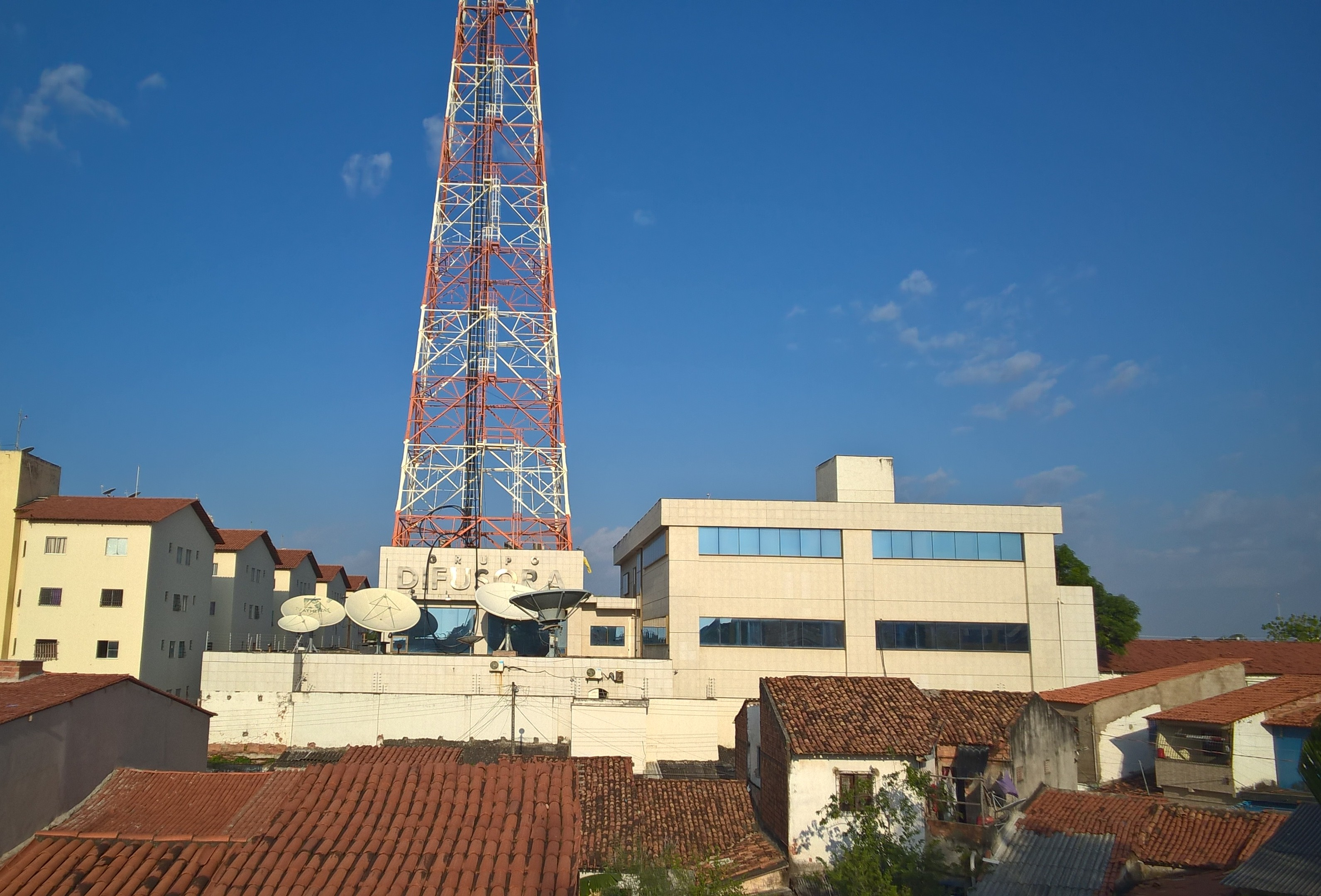 Sede do Sistema Difusora de Comunicação, grupo de comunicação sediado em São Luís, MA - Brasil